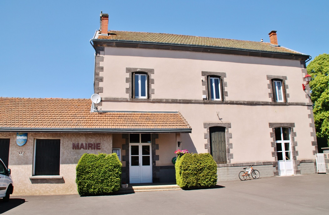 La Mairie